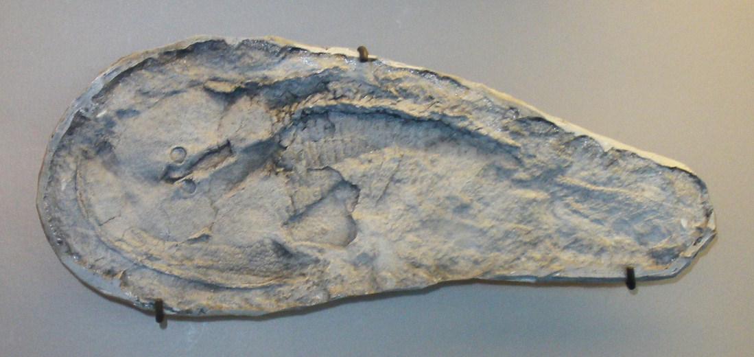 Fossil of Zenaspis, an extinct fish Took the photo at Musee d'Histoire Naturelle, Brussels